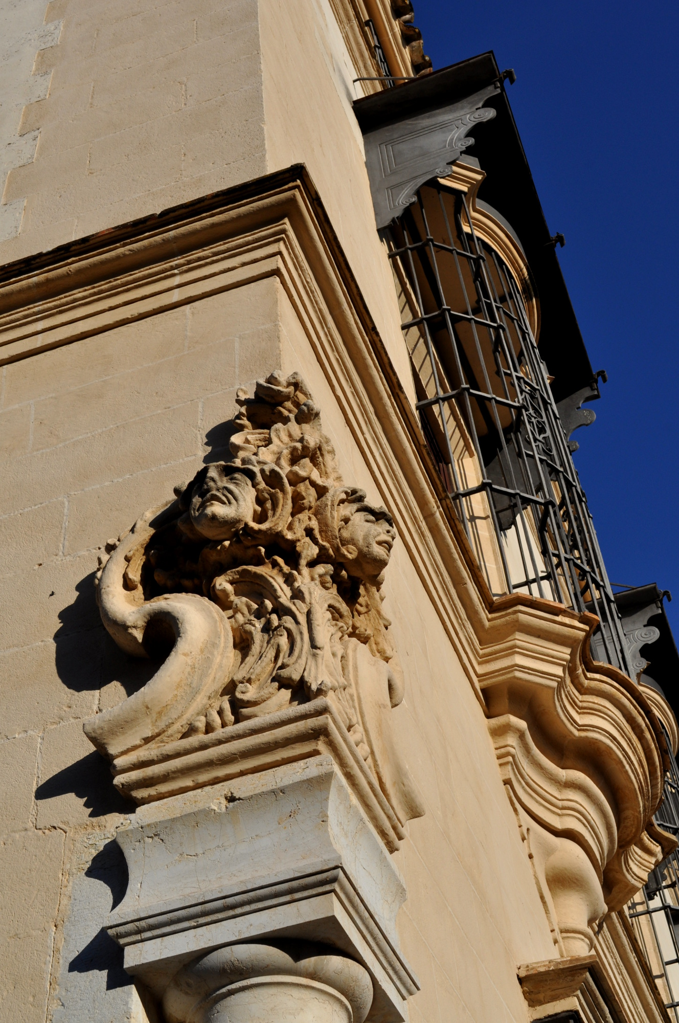 Detalle columna en el Palacio del Marqués de Montana en Jerez de la Frontera